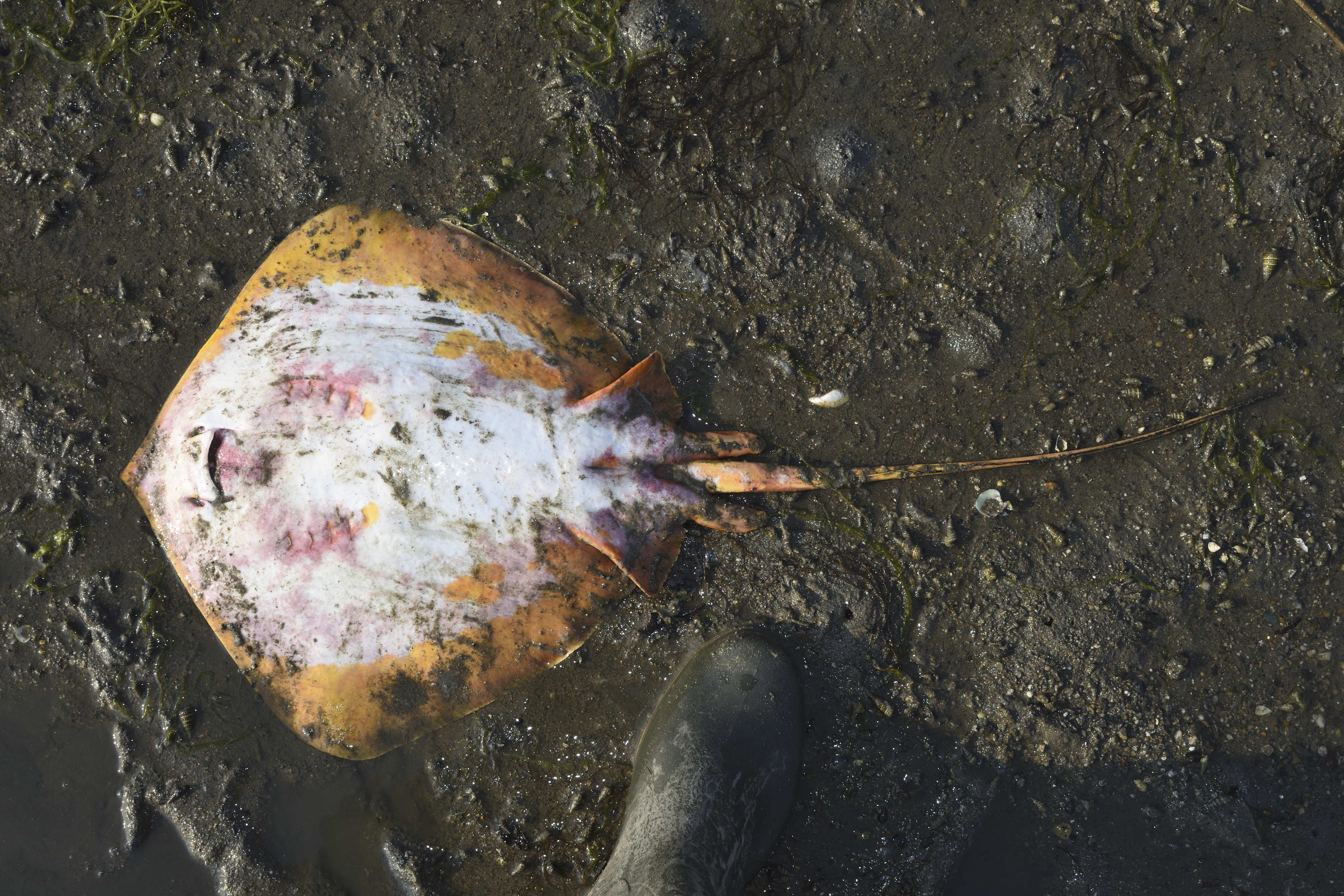 アカエイの腹面。福岡県今津干潟に打ち上がった死体。詳細